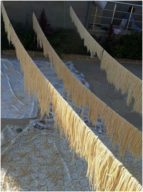 Ərişdənin hazırlanması